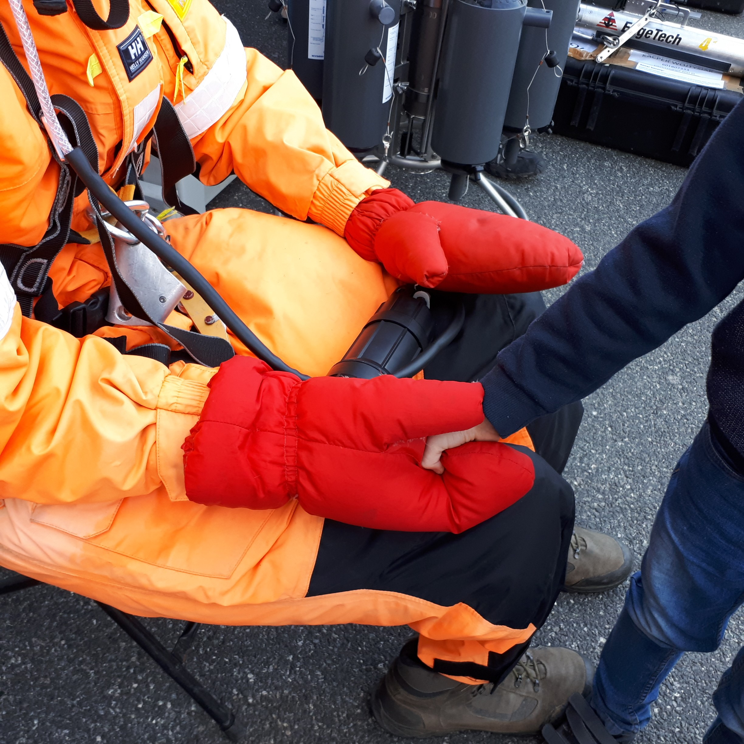 Stanowisko Instytutu Geofizyki PAN, PolarPOL. Centrum Nauki Kopernik, Polskie Radio - 23. Piknik Naukowy 2019